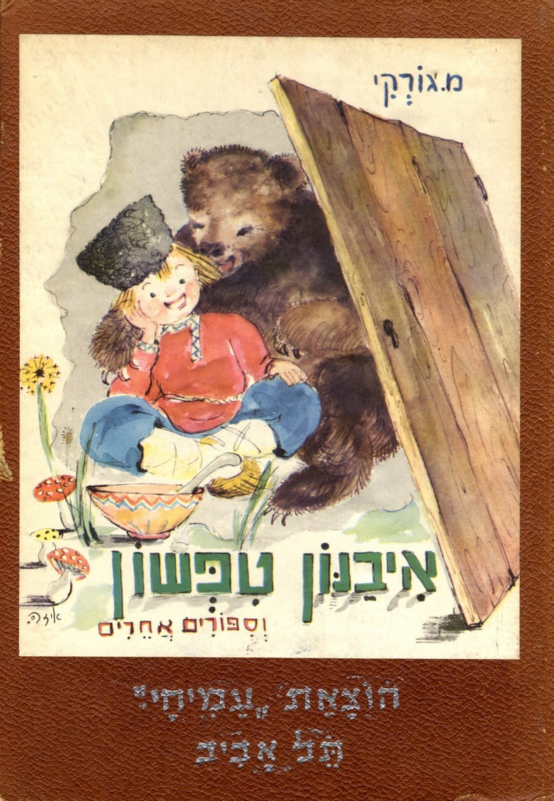 כריכת הספר איבנון טיפשון וספורים אחרים, תל אביב 1955